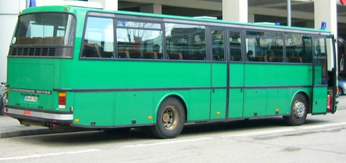 Kraftomnibus der deutschen Bundespolizei